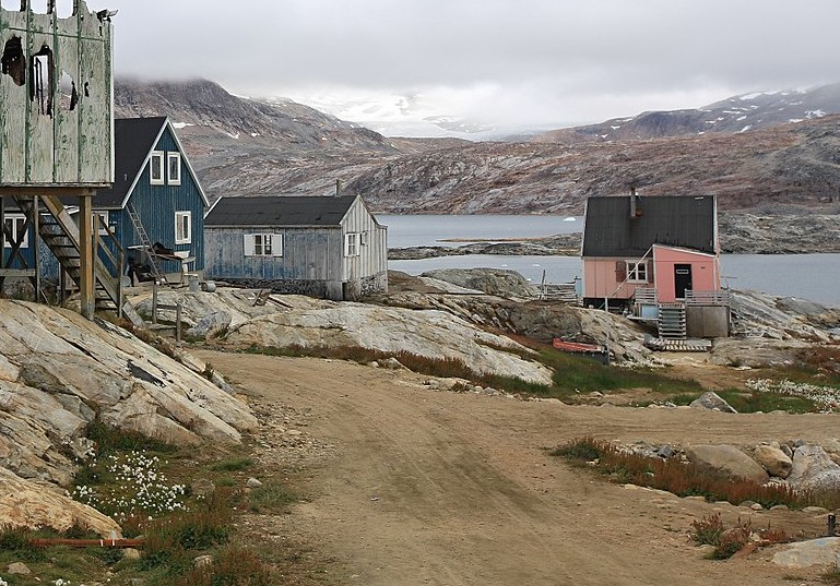 Panorama et habitations à Tiniteqilaaq, sur les rives du fjord Sermilik, sud-est du Groenland